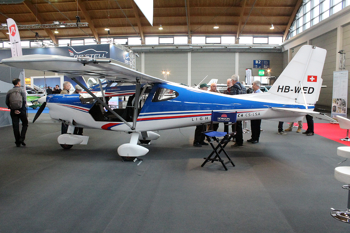 HB-WED LightWing Aviation AC4CS-LSA @ Friedrichshafen 10/04/2019